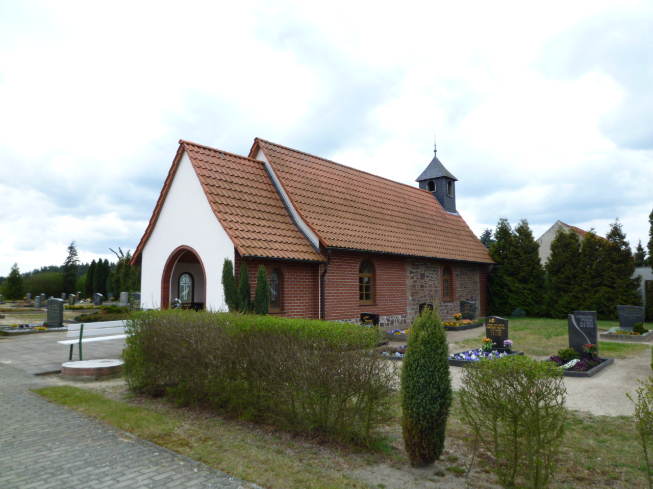 Calvörde-Mannhausen, Friedhofskapelle, Nordansicht